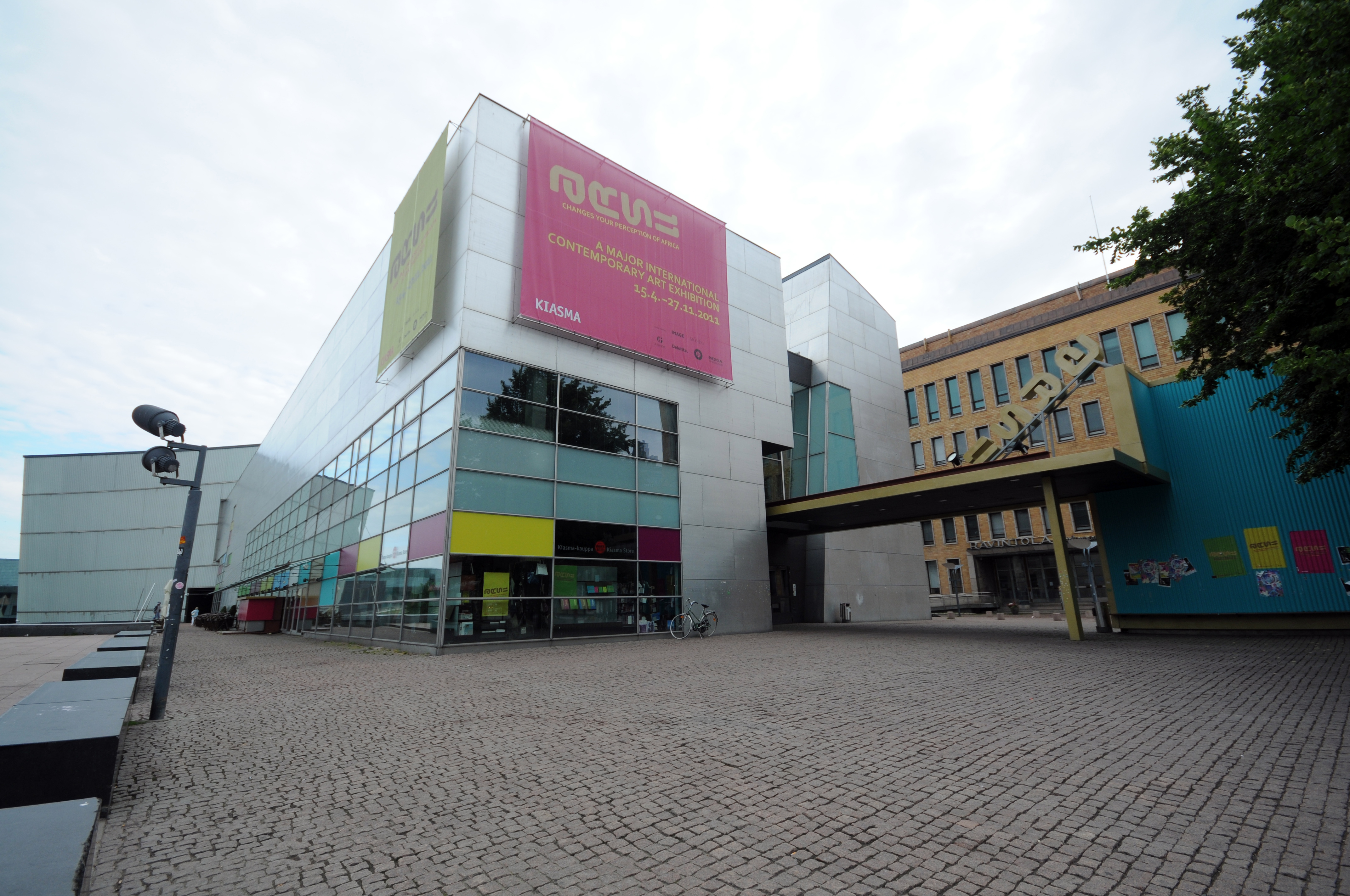 Helsinki